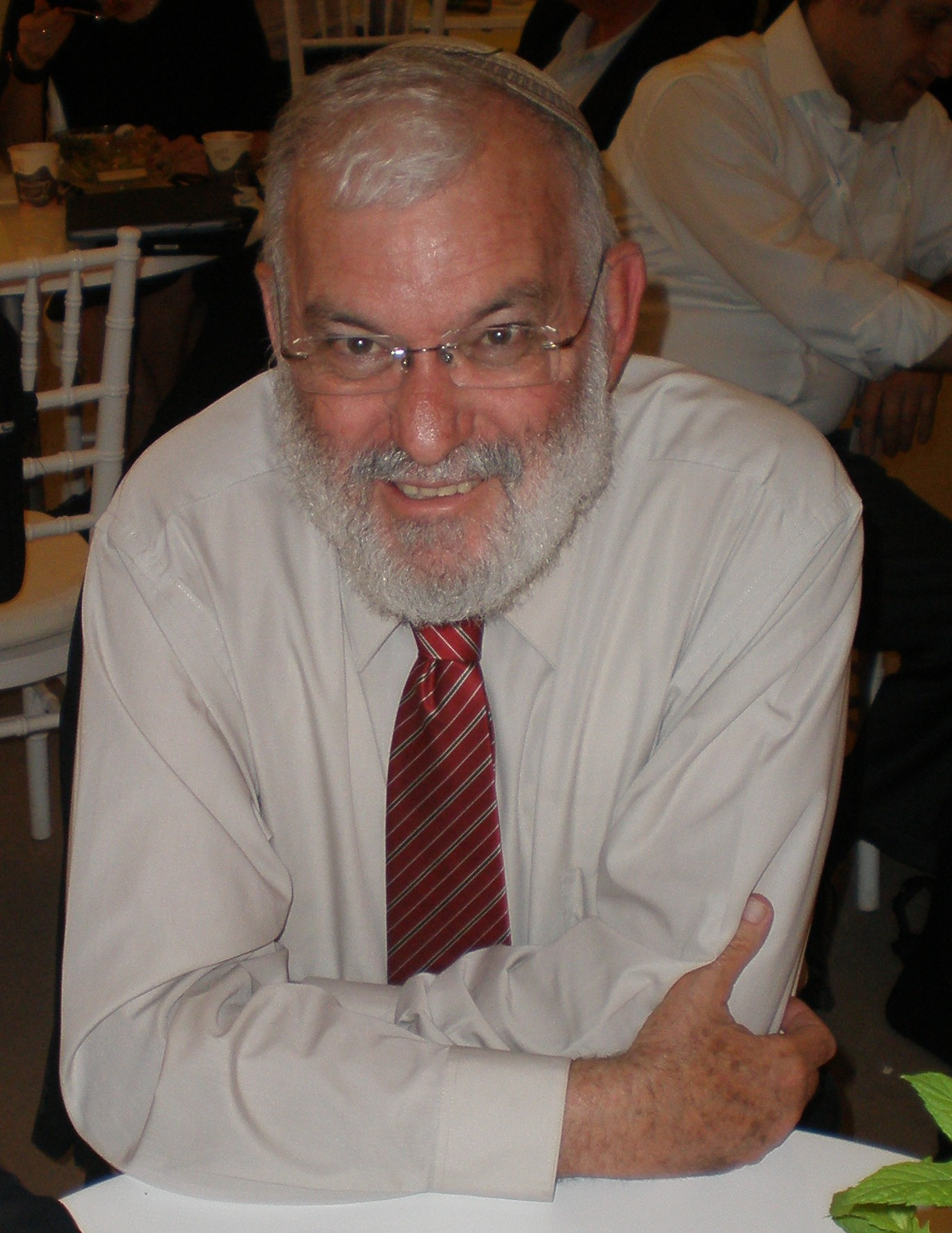 יעקב עמידרור